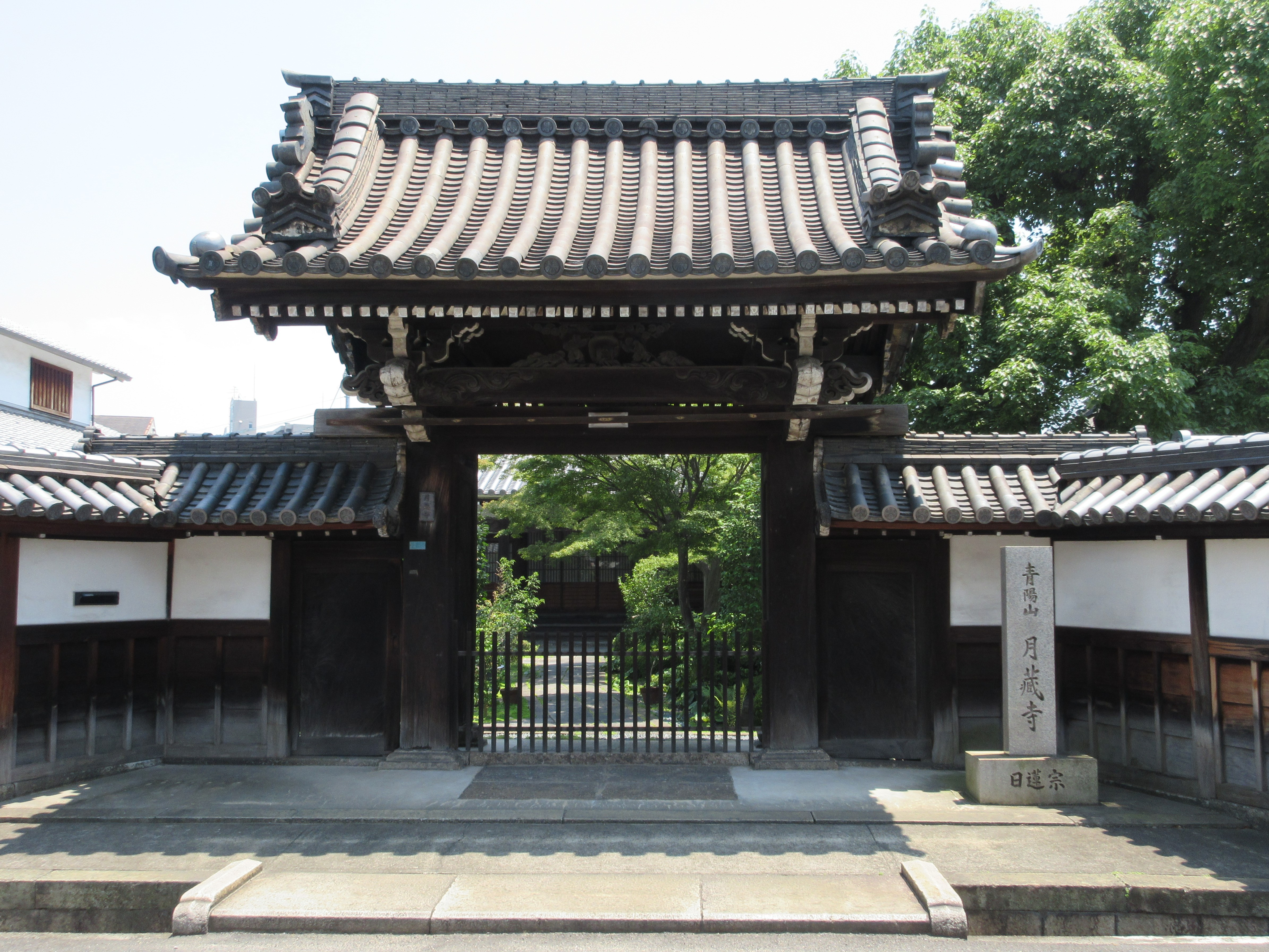 月蔵寺山門